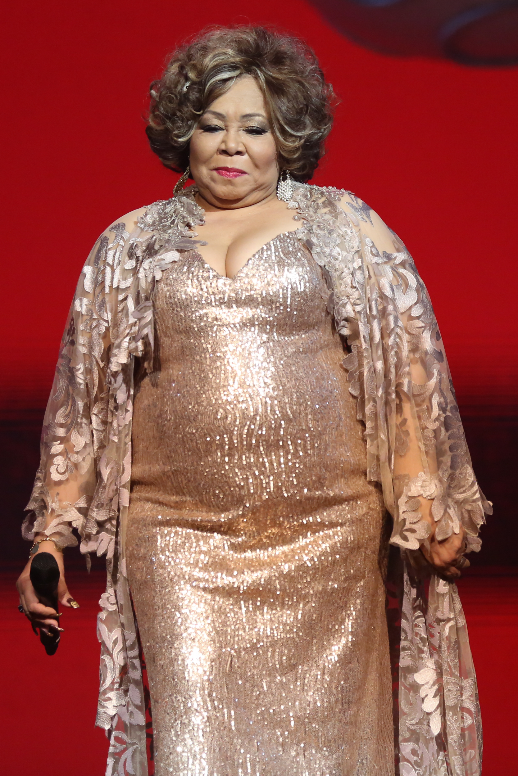 Alcione - 26° Prêmio da Música Brasileira 2015, no Theatro Municipal, no Centro do Rio de Janeiro/RJ. (10/06/15) Foto: Roberto Filho/Divulgacão